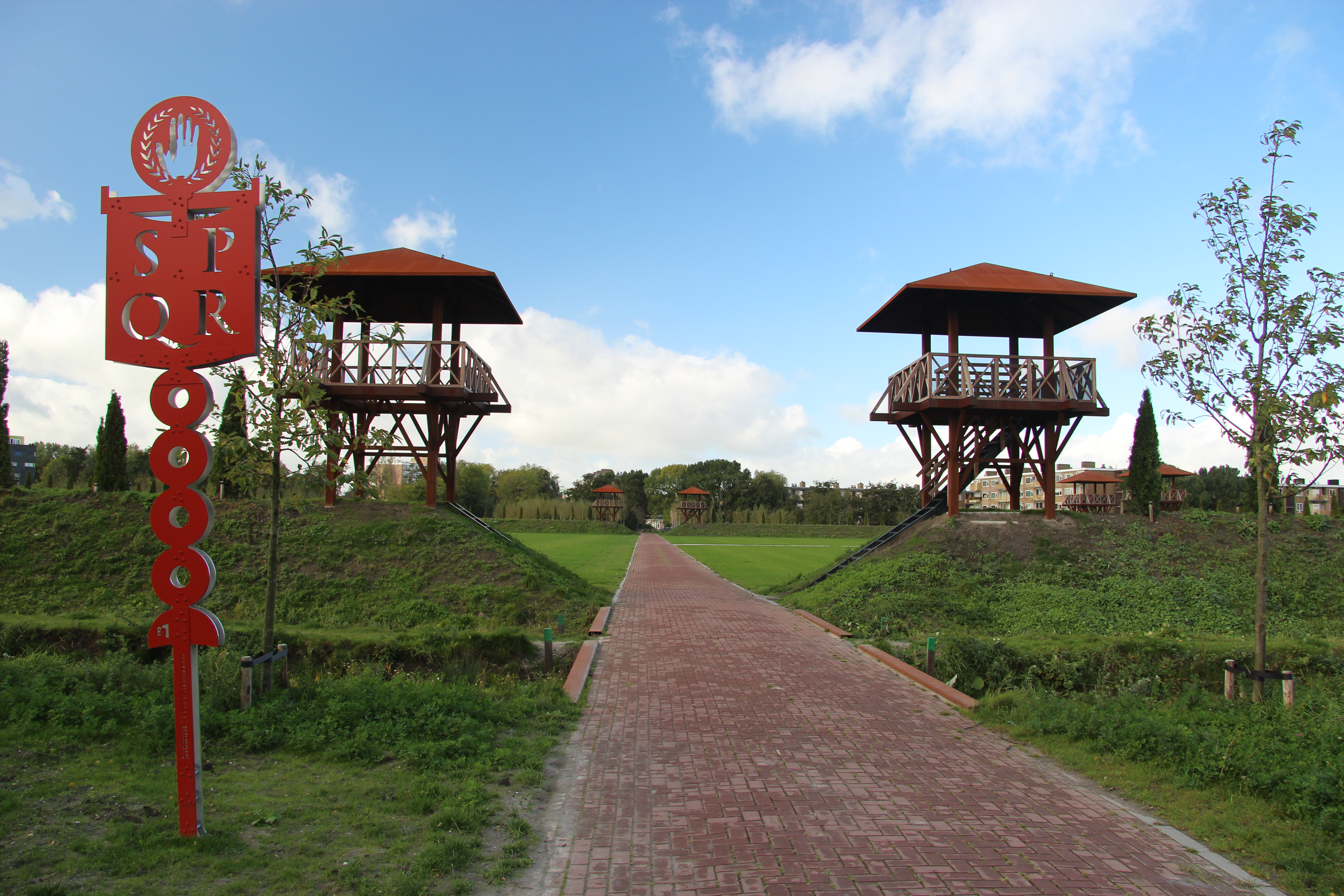 Oostpoort van de reconstructie van castellum Matilo in het Archeologisch Park Matilo te Leiden.